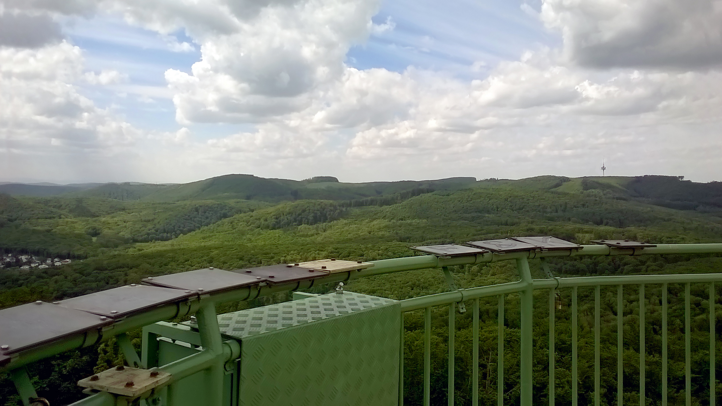 Wien-Ottakring, Aussichtsplattform Jubiläumswarte, Blick nach Nordwest mit Sendeturm Exelberg im Norden